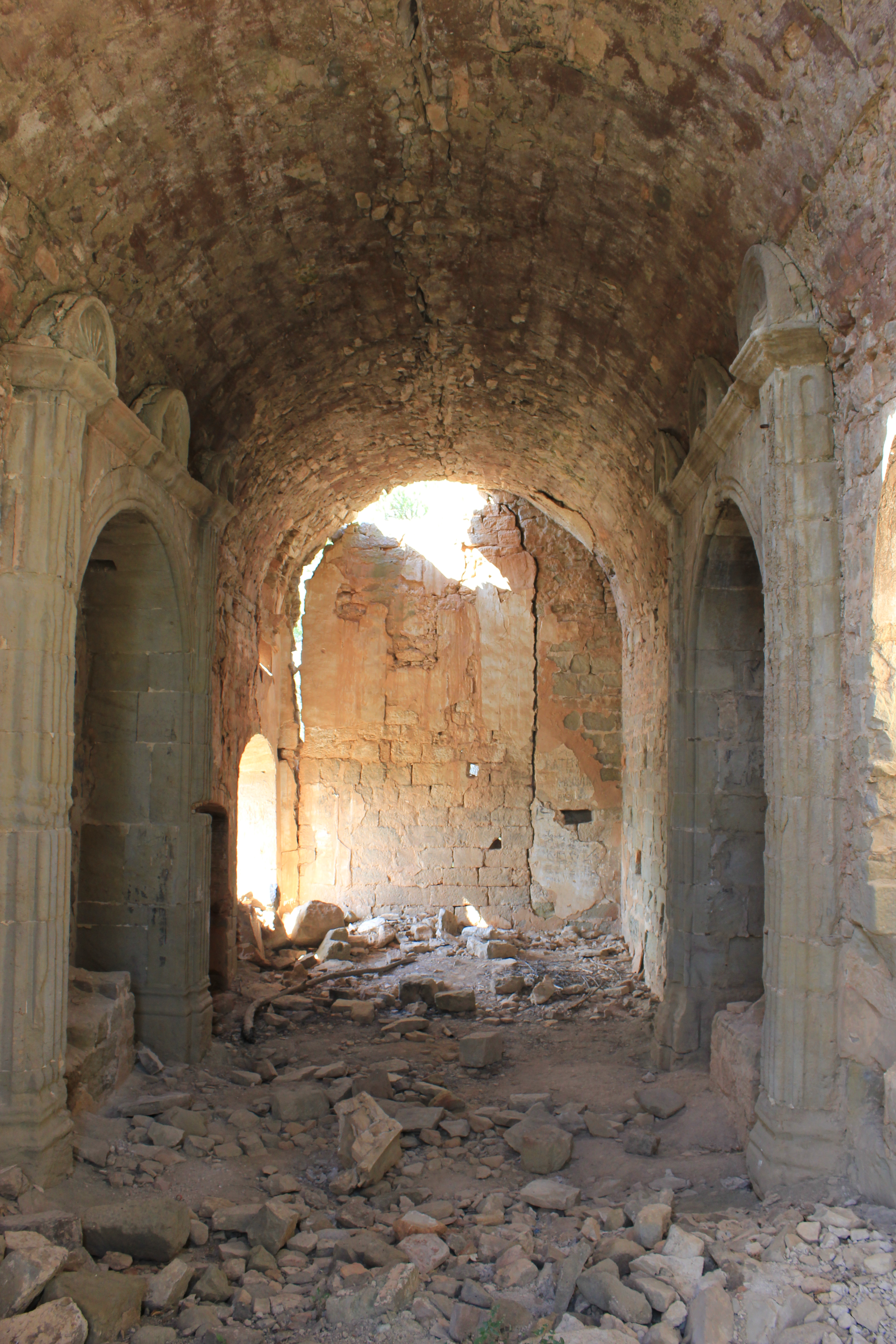 Nau interior del Castell de Clariana - Clariana de Cardener (Solsonès)